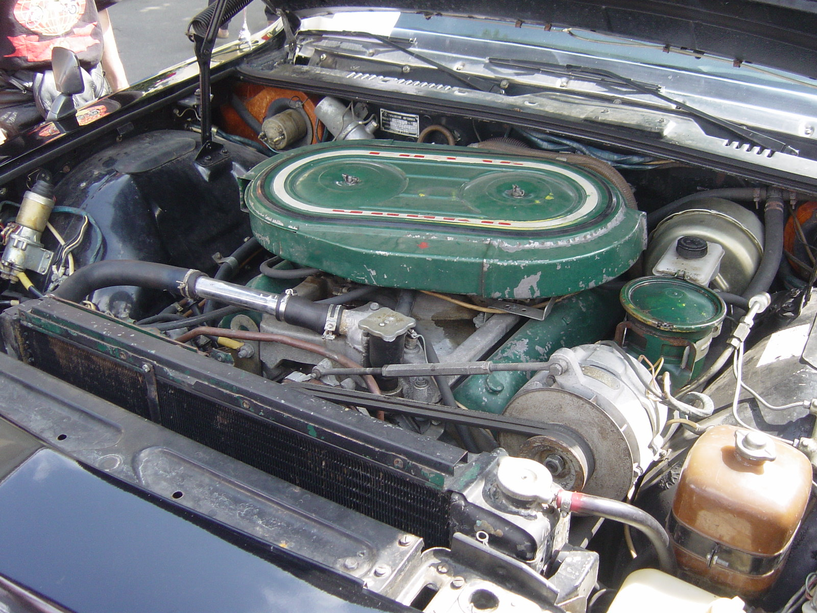 GAZ-14 Chaika engine at the Szocialista Jáműipar Gyöngyszemei 2008.